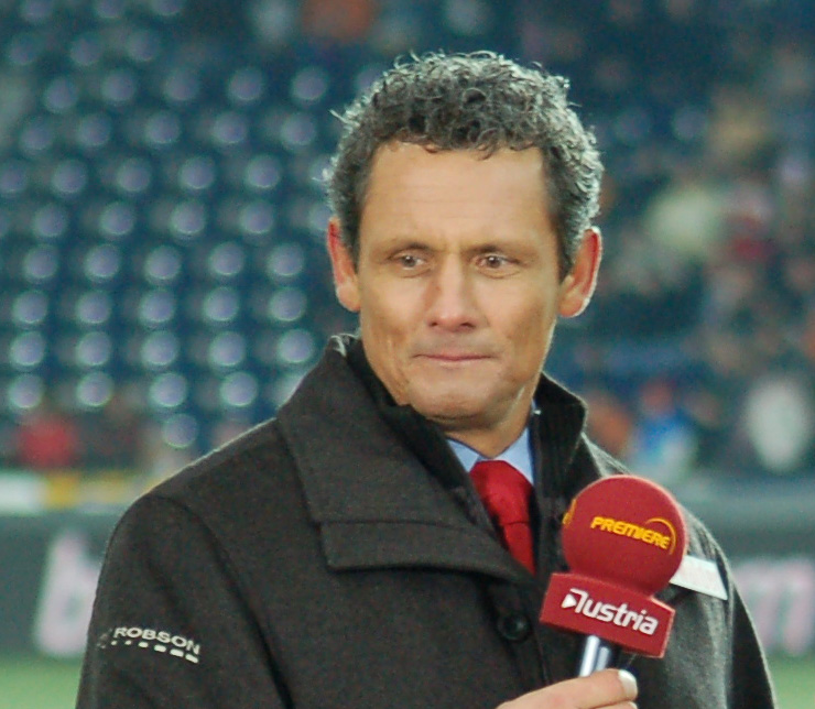 Heribert Weber bei einem Interview im EM-Stadion Wals-Siezenheim